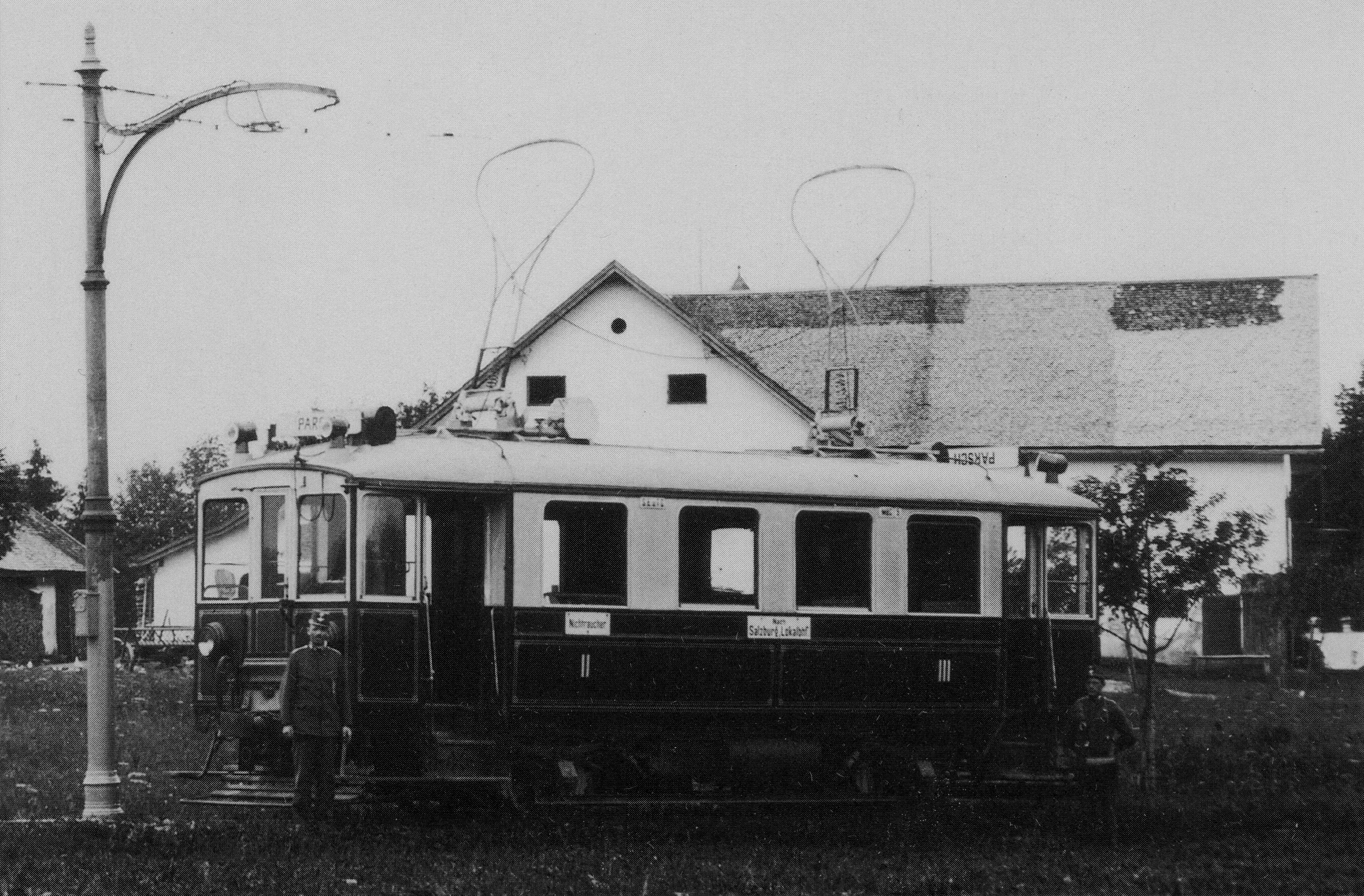 Ein Wagen der sog. Roten Elektrischen, der früheren Salzburger Lokalbahn, in Salzburg-Parsch.